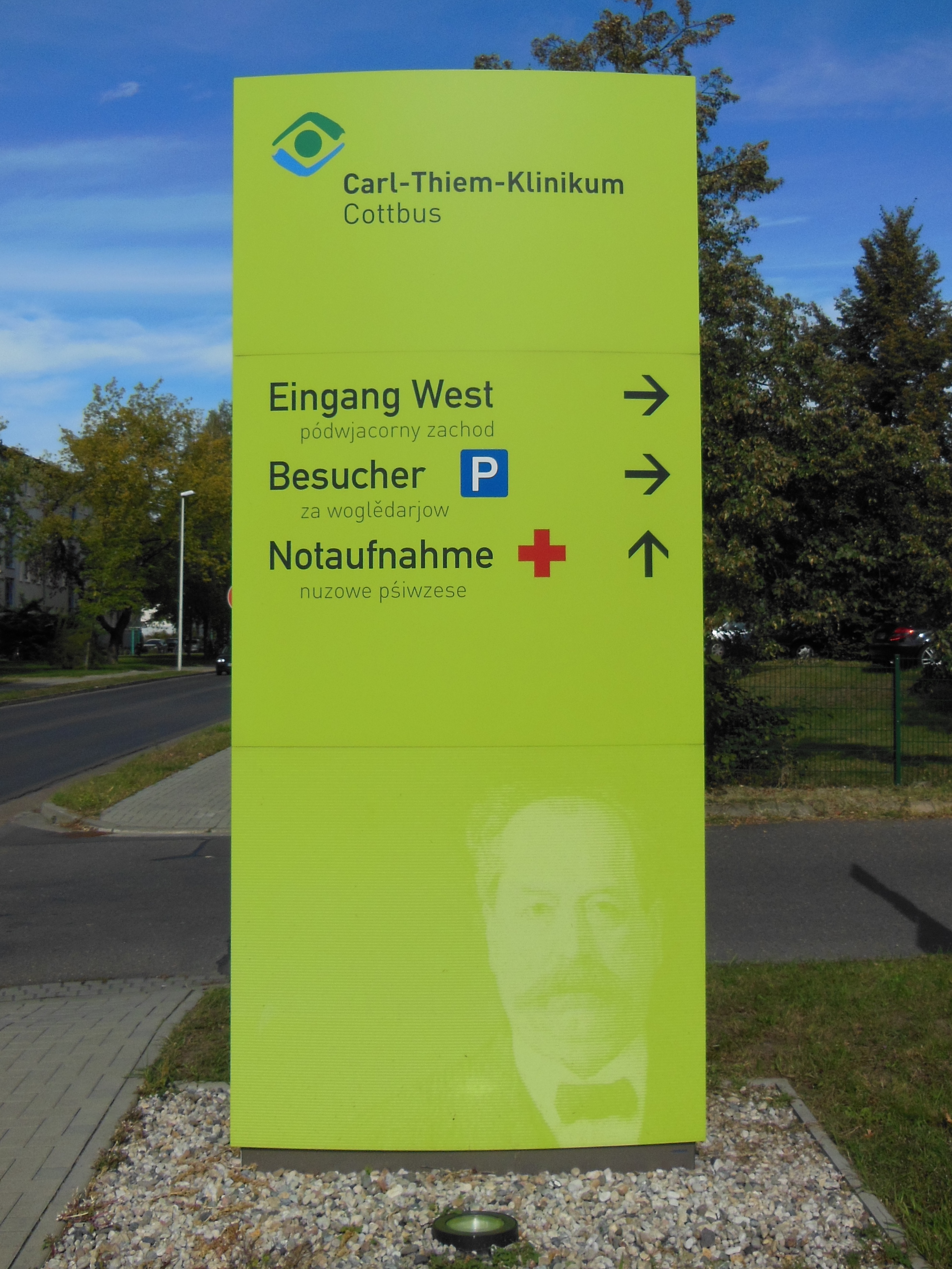 Wegweiser Carl-Thiem-Klinikum Cottbus (Deutsch/Niedersorbisch)